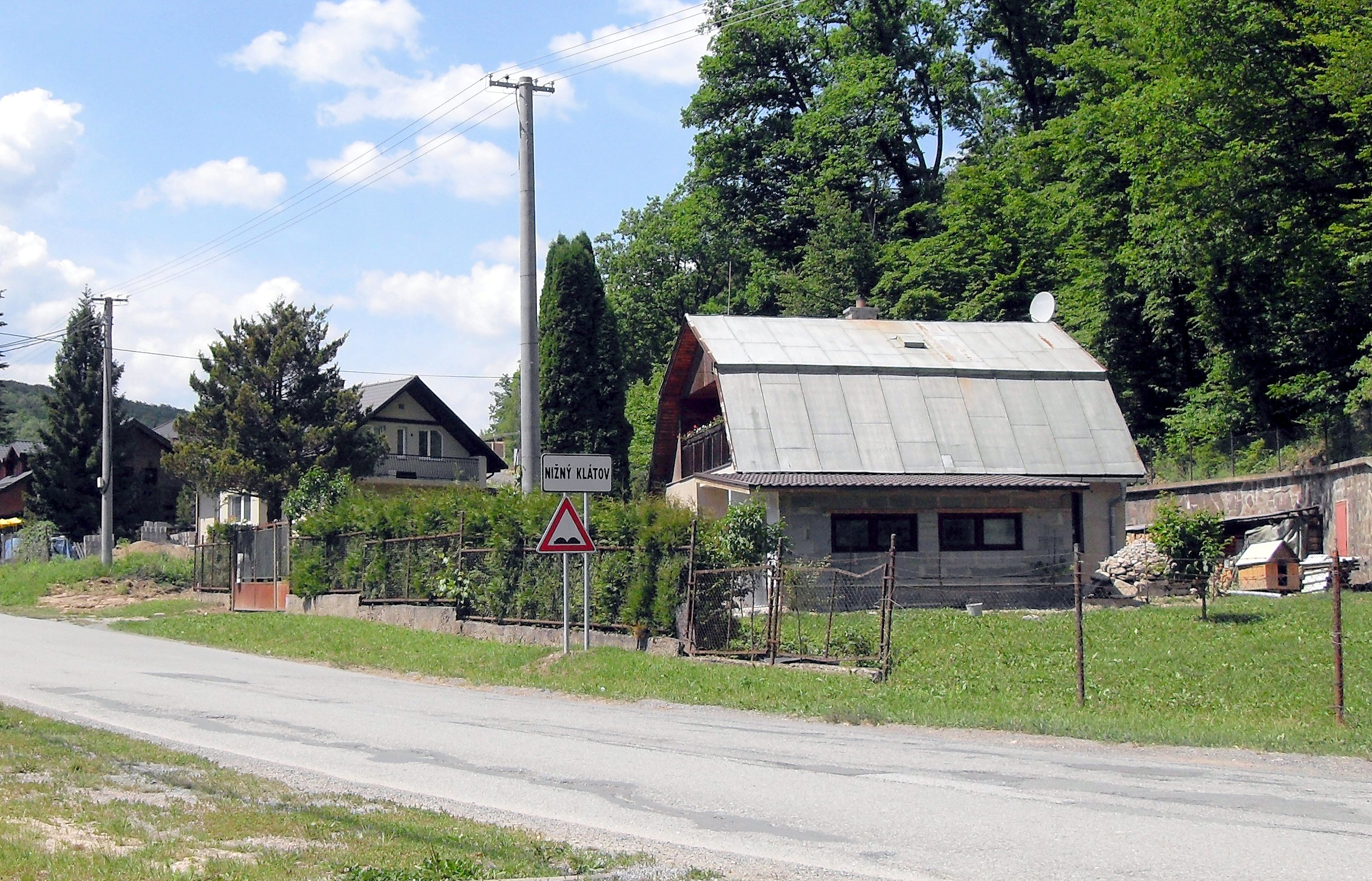 východnej vstup Nižný Klátov